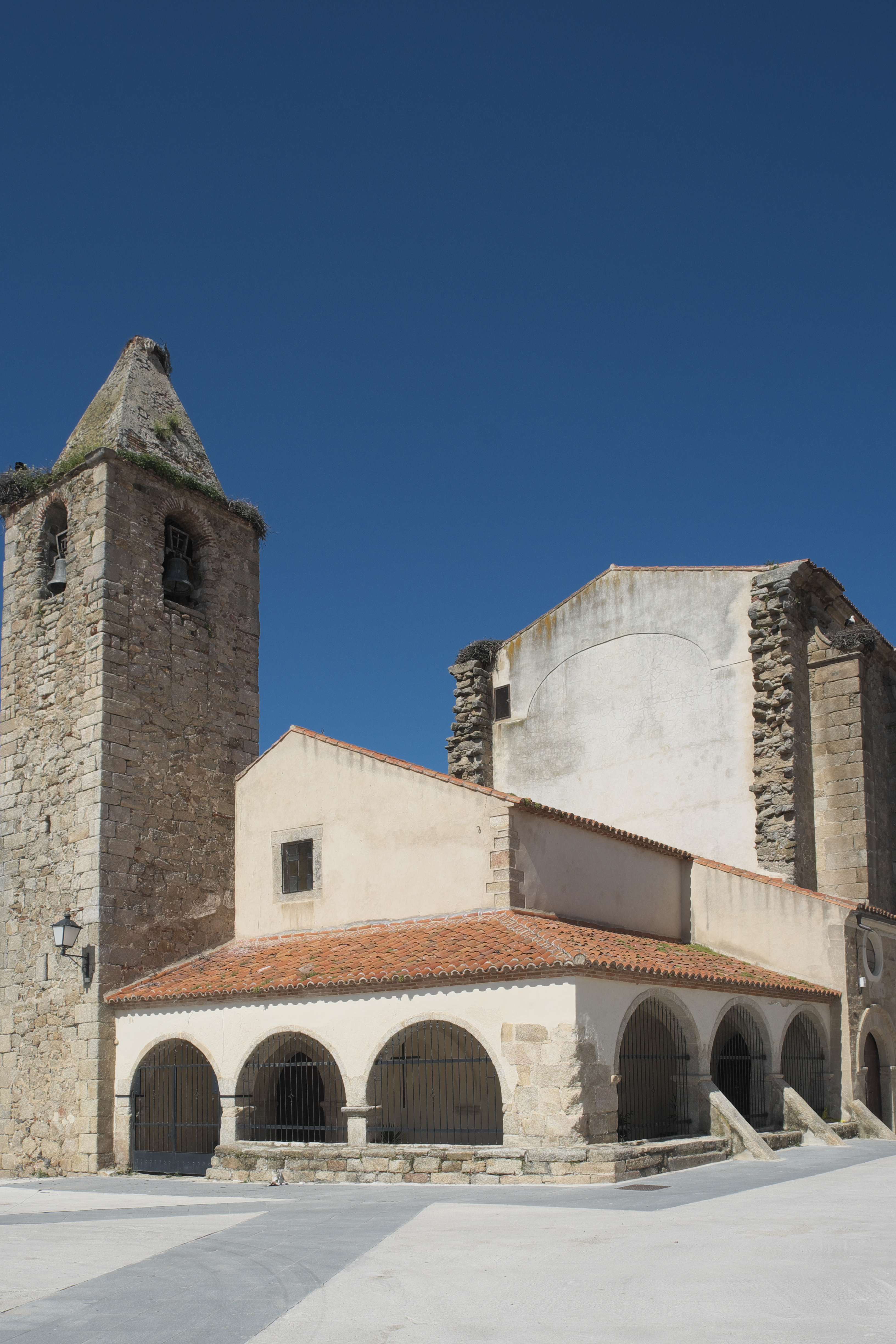 Katholische Kirche San Esteban in Torrequemada in der Provinz Cáceres (Extremadura/Spanien)